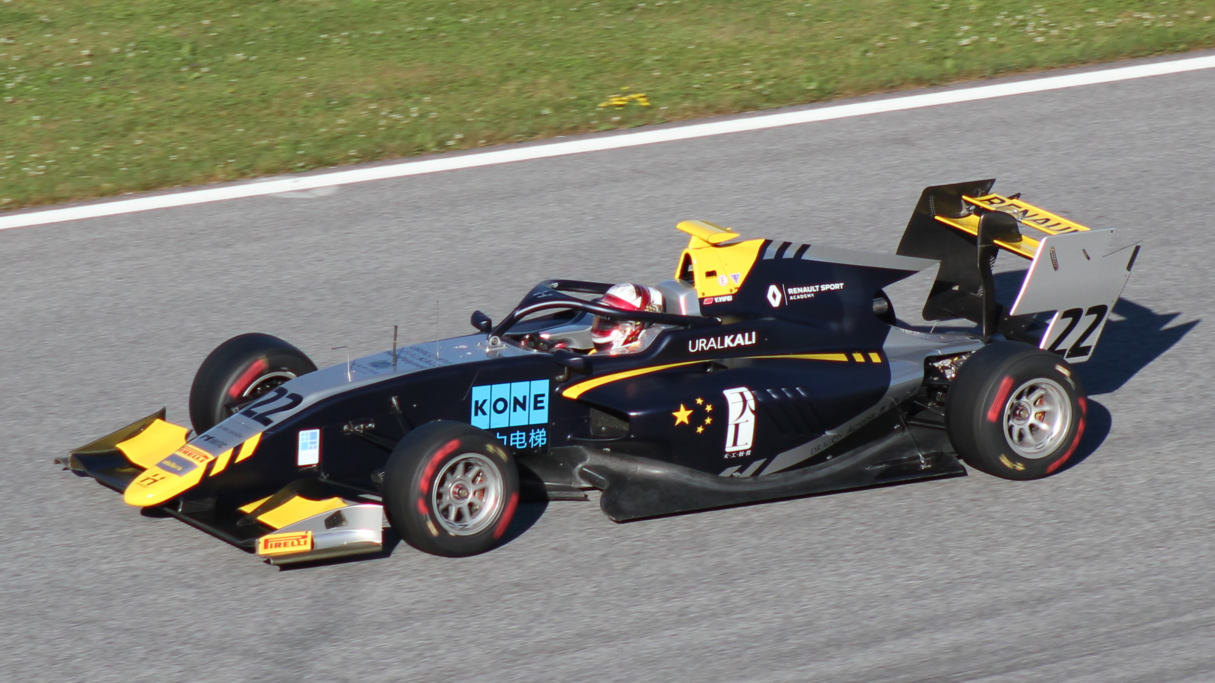 Yifei beim Rennwochenende in Österreich 2019